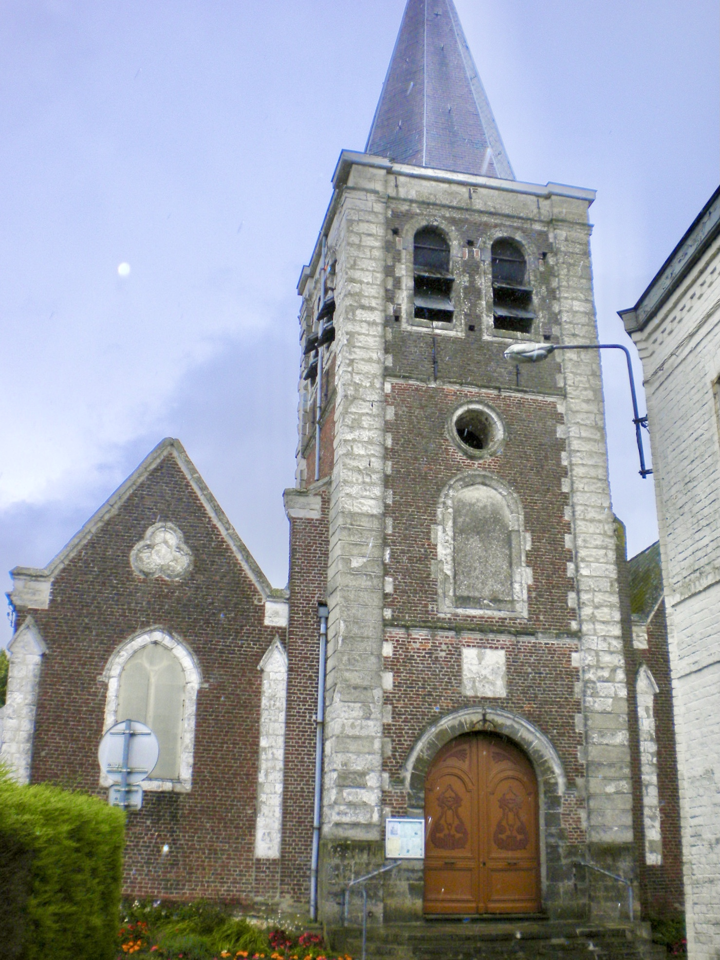 Anstaing_église Saint Laurent